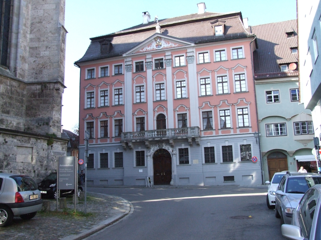 Der Hermansbau, eine vierflügelige Anlage bei St. Martin, eines der Barockpalais in Memmingen.